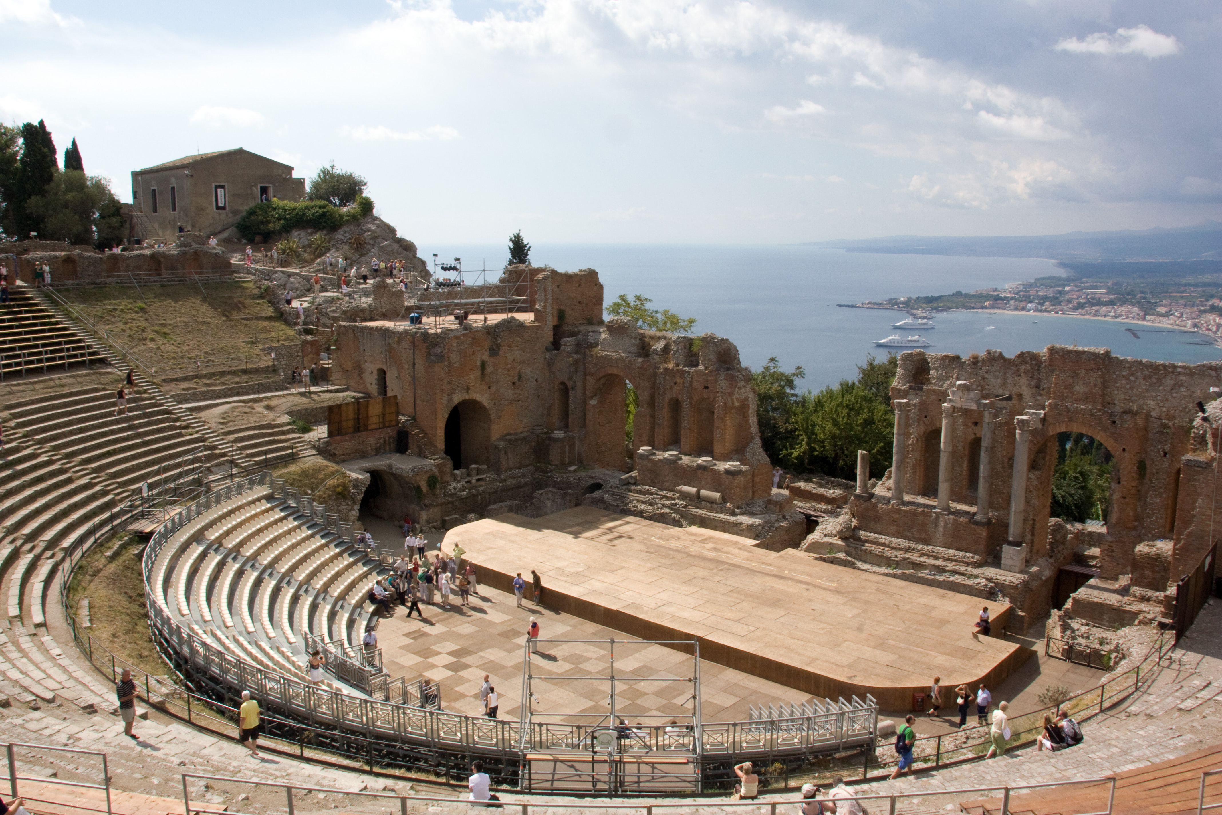 Théâtre greco-romain de Taormina